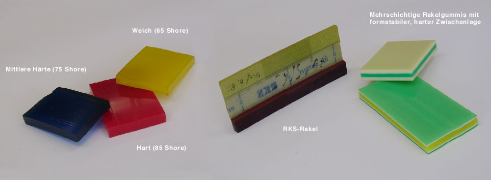 Siebdruckrakel